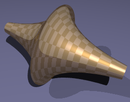 partial pseudosphere